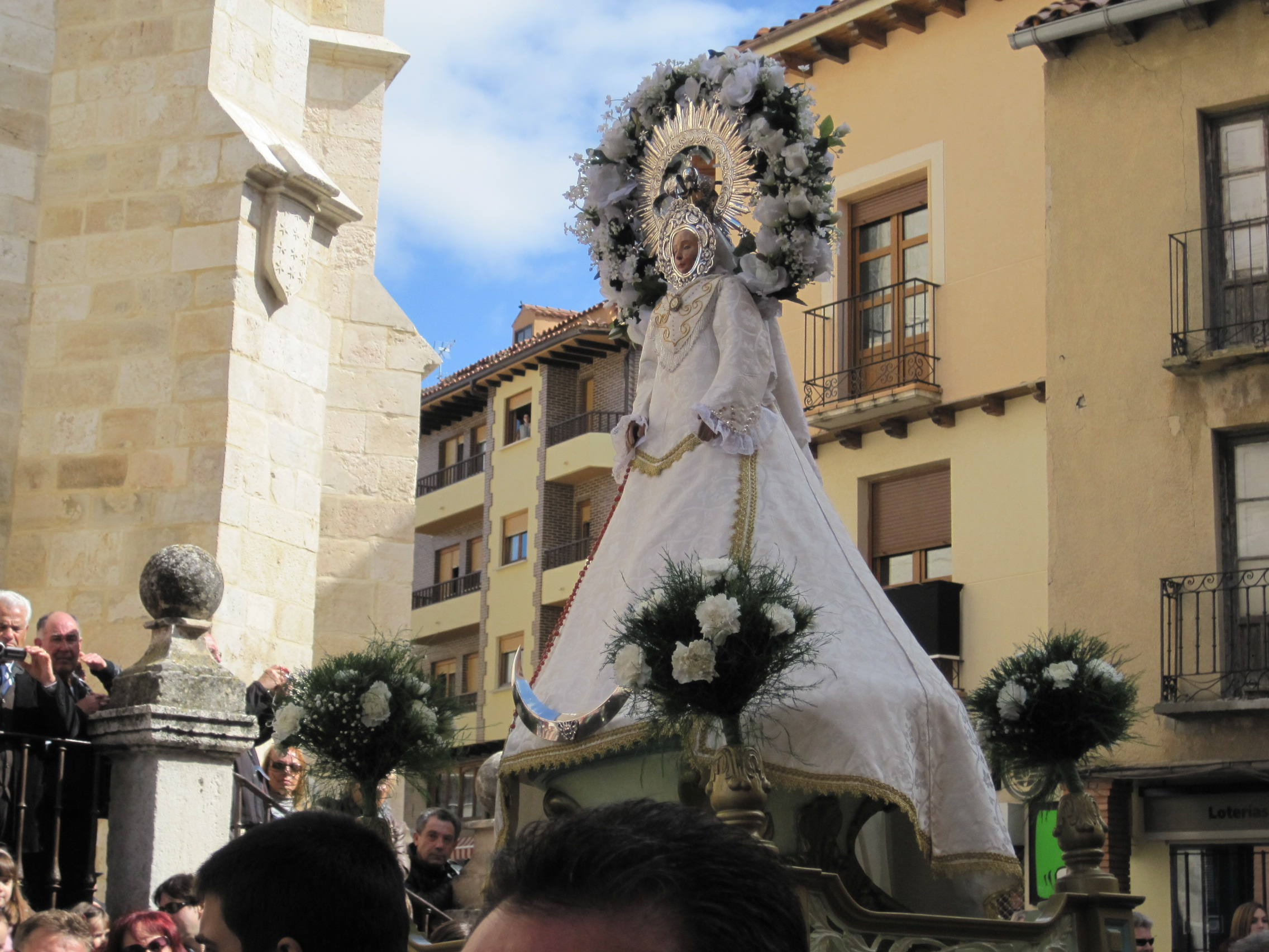 Imagen de Nuestra Señora de la Misericordia, el domingo de Pascua en Aranda de Duero, Burgos.